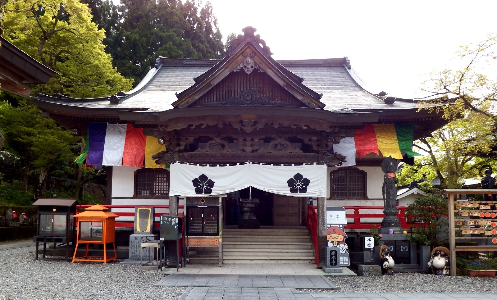 岩本寺の本堂